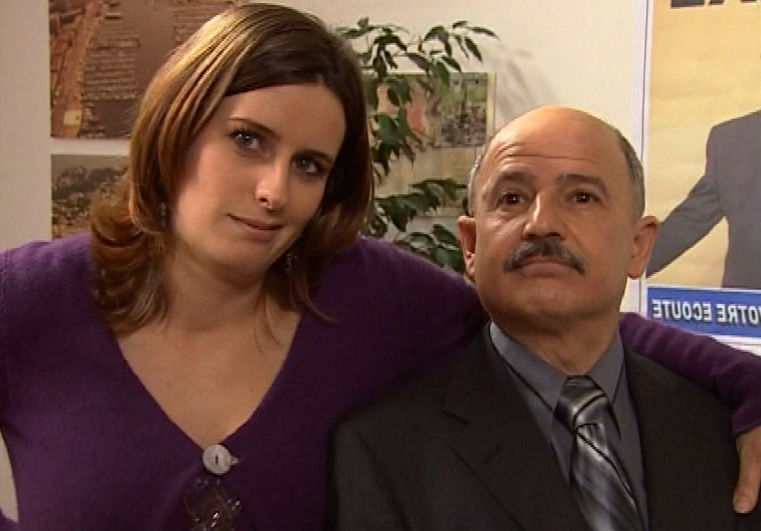 Richard Guedj et Anne Décis, le 8 mars 2006, sur le plateau de tournage de Plus belle la vie à Marseille